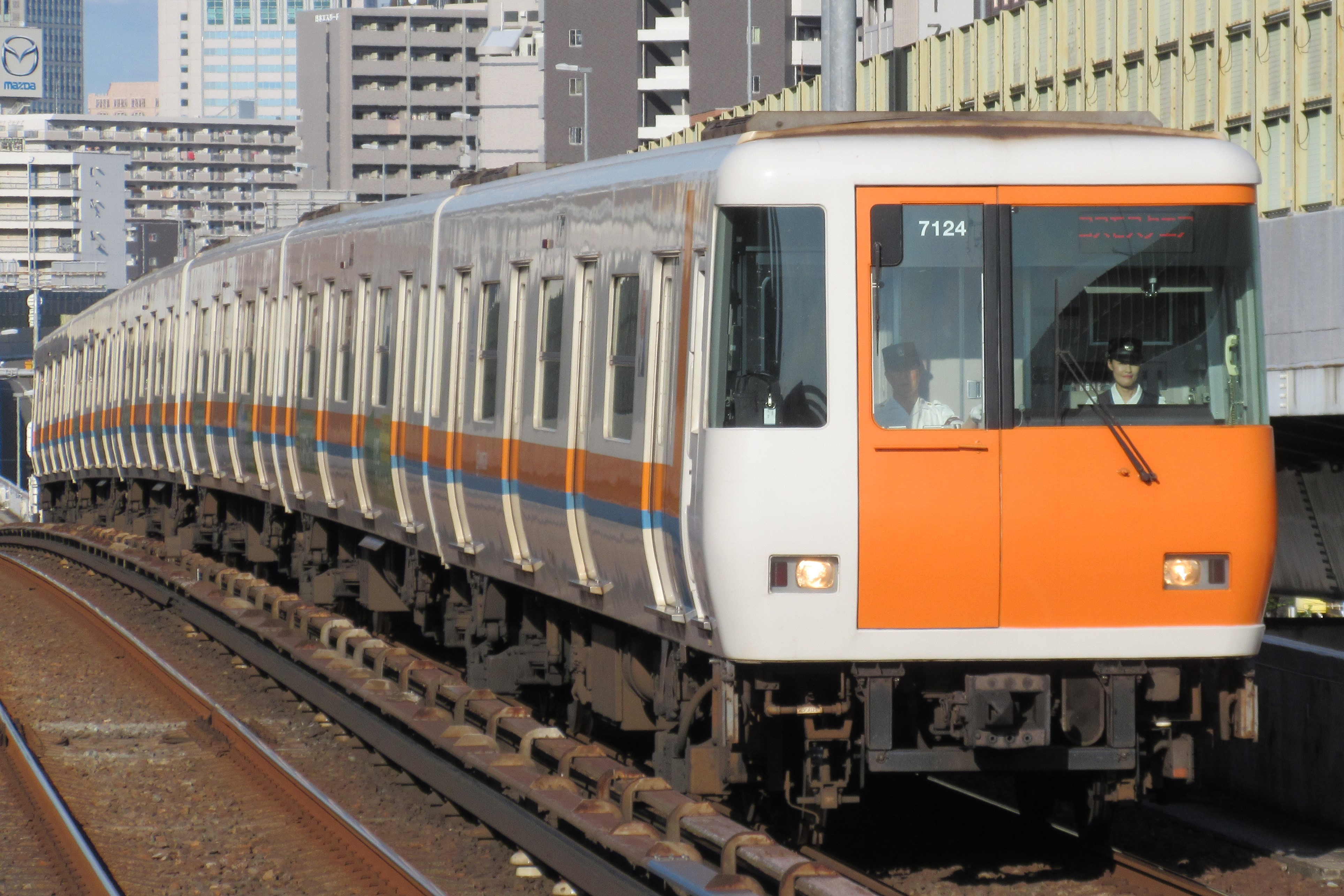 近鉄7124 (九条駅にて)